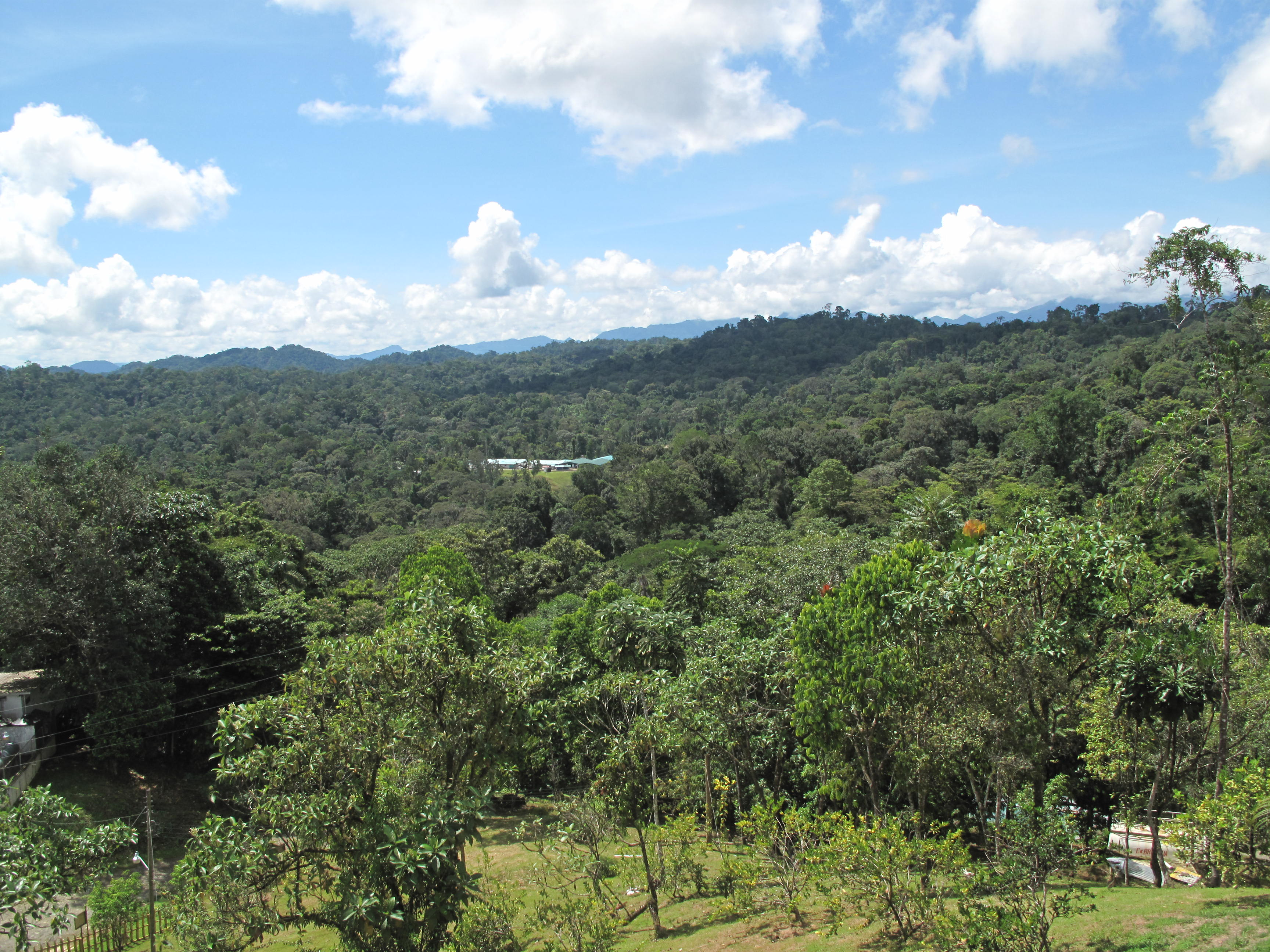 Panama